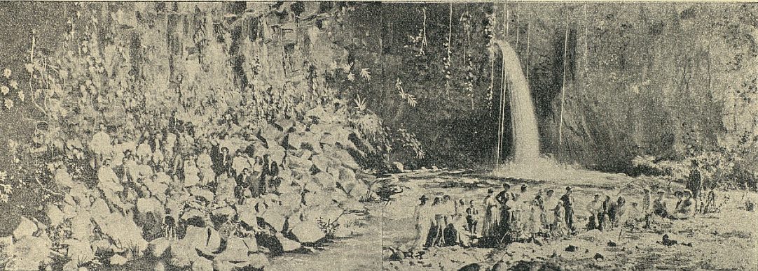 Excursión a las Grutas de San Pedro Mártir en 1907. Fotografía de Justo Castellón h., publicada en "La Locomotora" el 15 de marzo de 1907